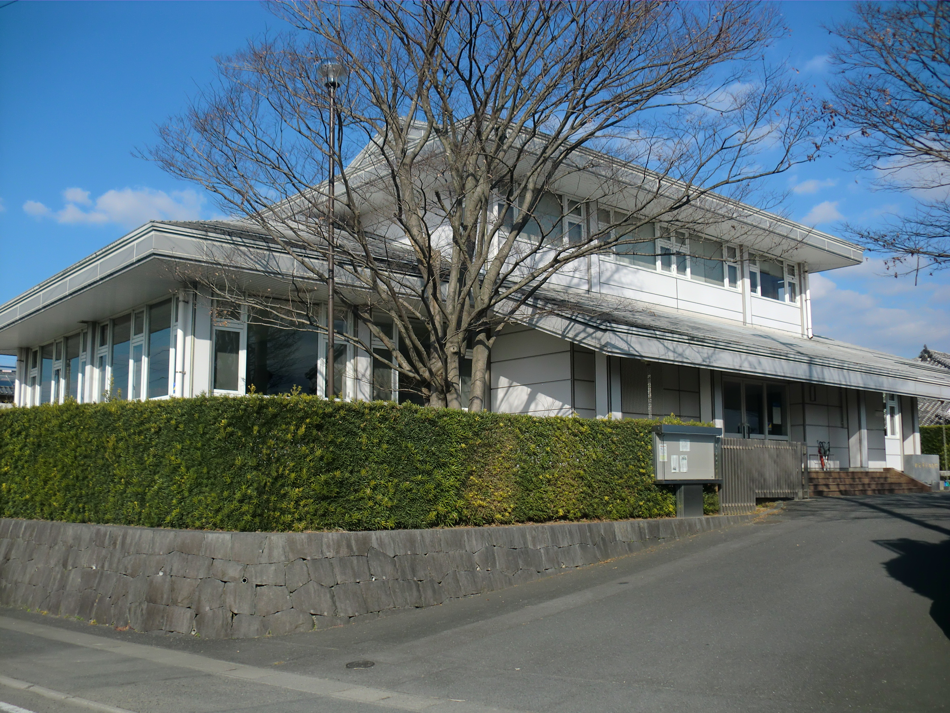 熊本県上益城郡嘉島町にある松前重義記念館